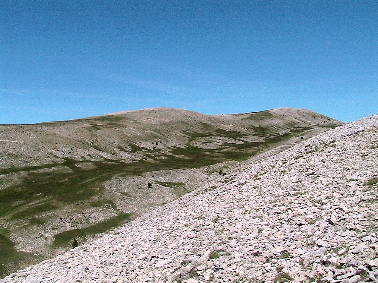 El Pedró dels Quatre Batlles, a la capçalera de la Coma de la Comtessa. Odèn (Solsonès - Catalunya)